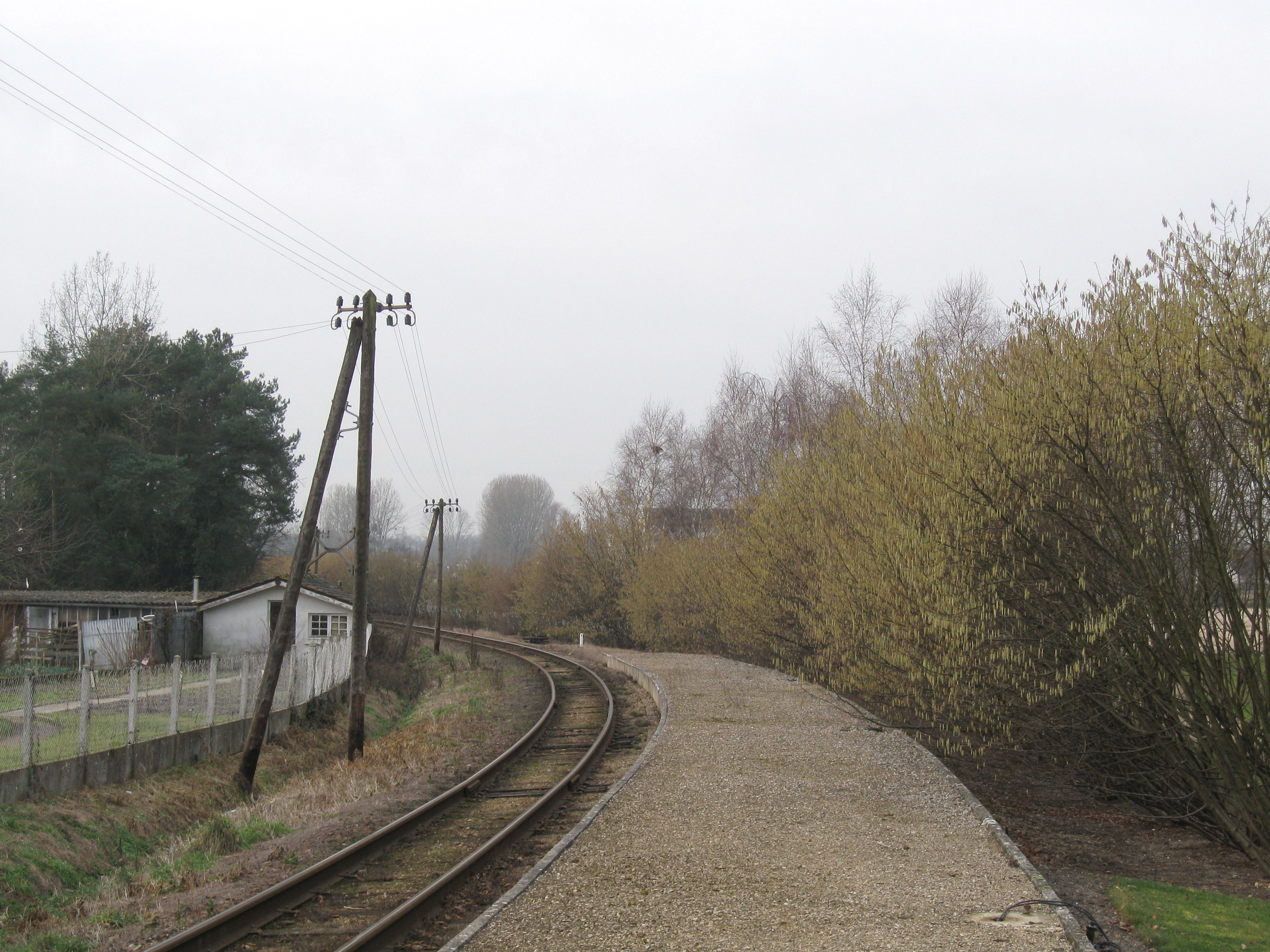 Voie en direction de la gare de Romorantin-Blanc-Argent et ancien quai de le gare du Faubourg-d'Orléans, Romorantin-Lanthenay, Loir-et-Cher, France